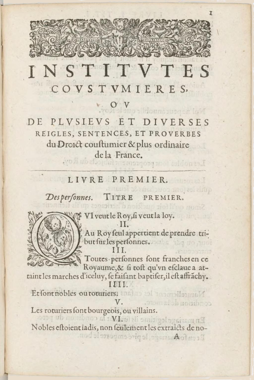 Antoine Loysel (1536-1617). Institutes coutumières ou manuel de plusieurs et diverses règles, sentences, & proverbes du droit coutumier & plus ordinaire de la France, Livre Premier, page I, article I à VI, Abel L'Angelier, Paris, 1607.